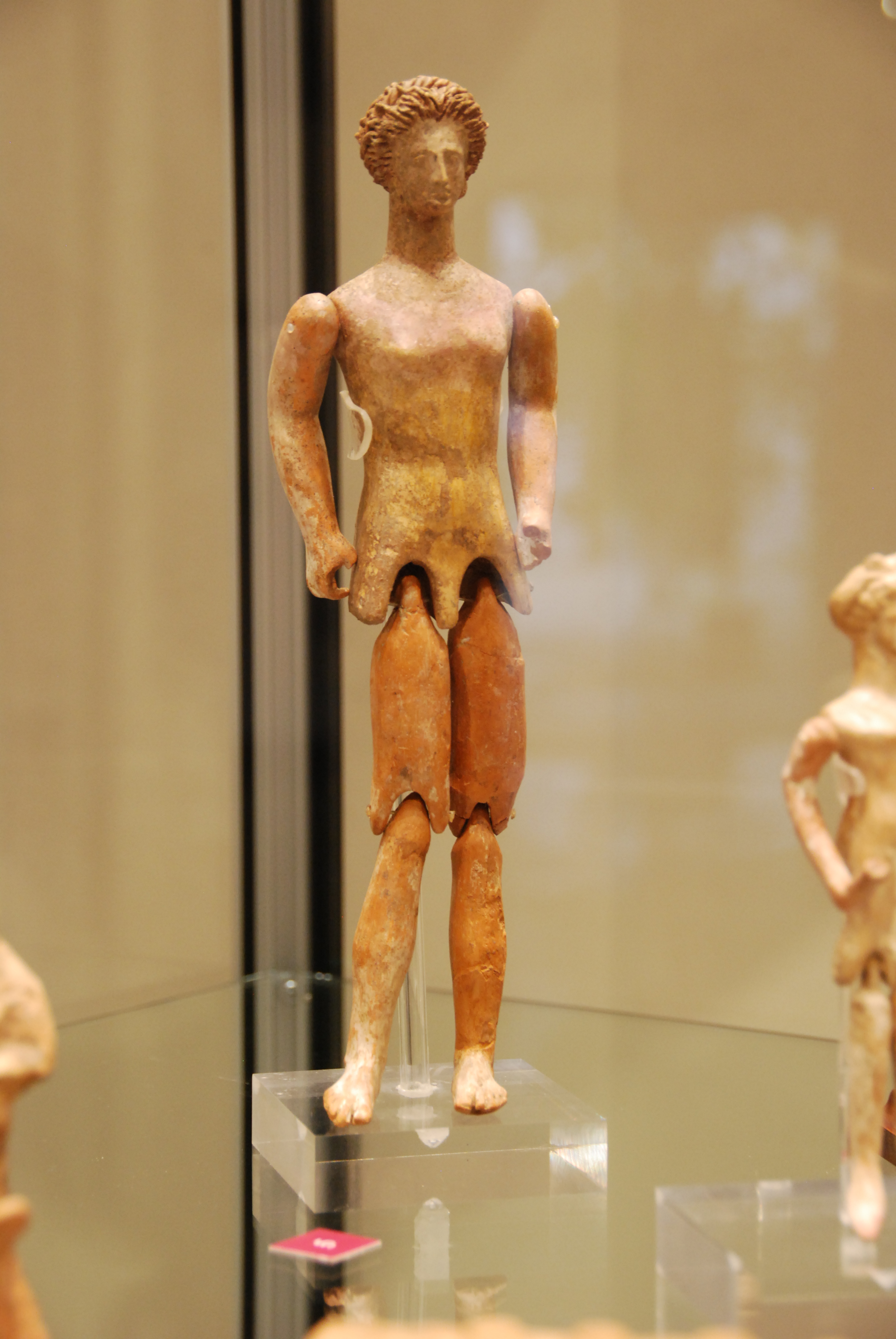 Antiquarium “Alda Levi” - MIBAC This is a photo of a monument which is part of cultural heritage of Italy.